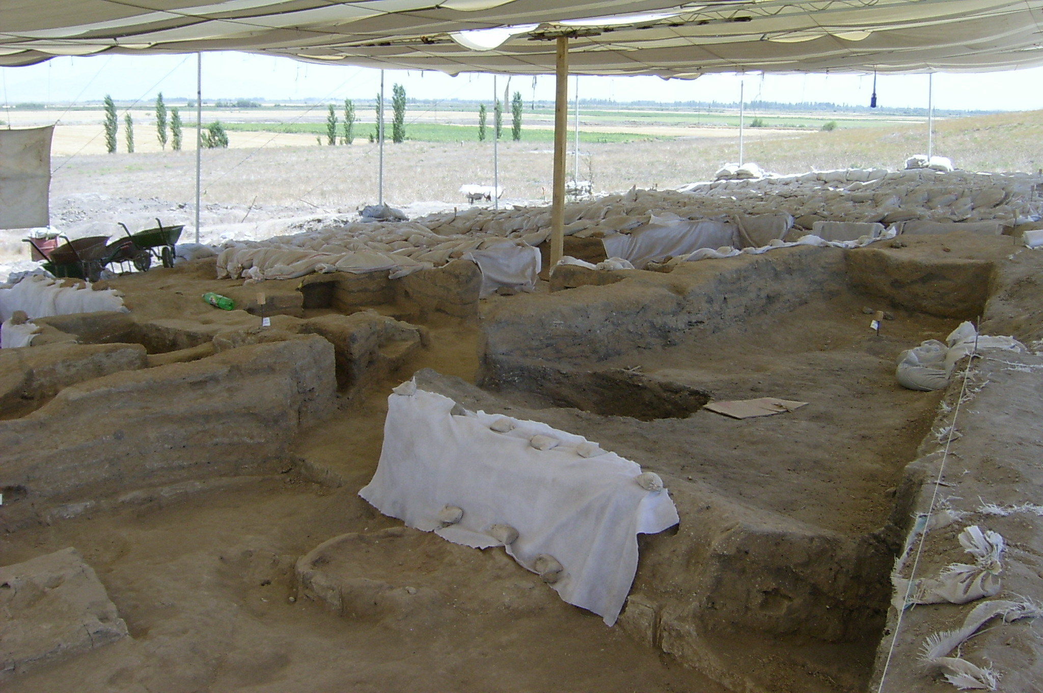 Çatal Hüyük excavations